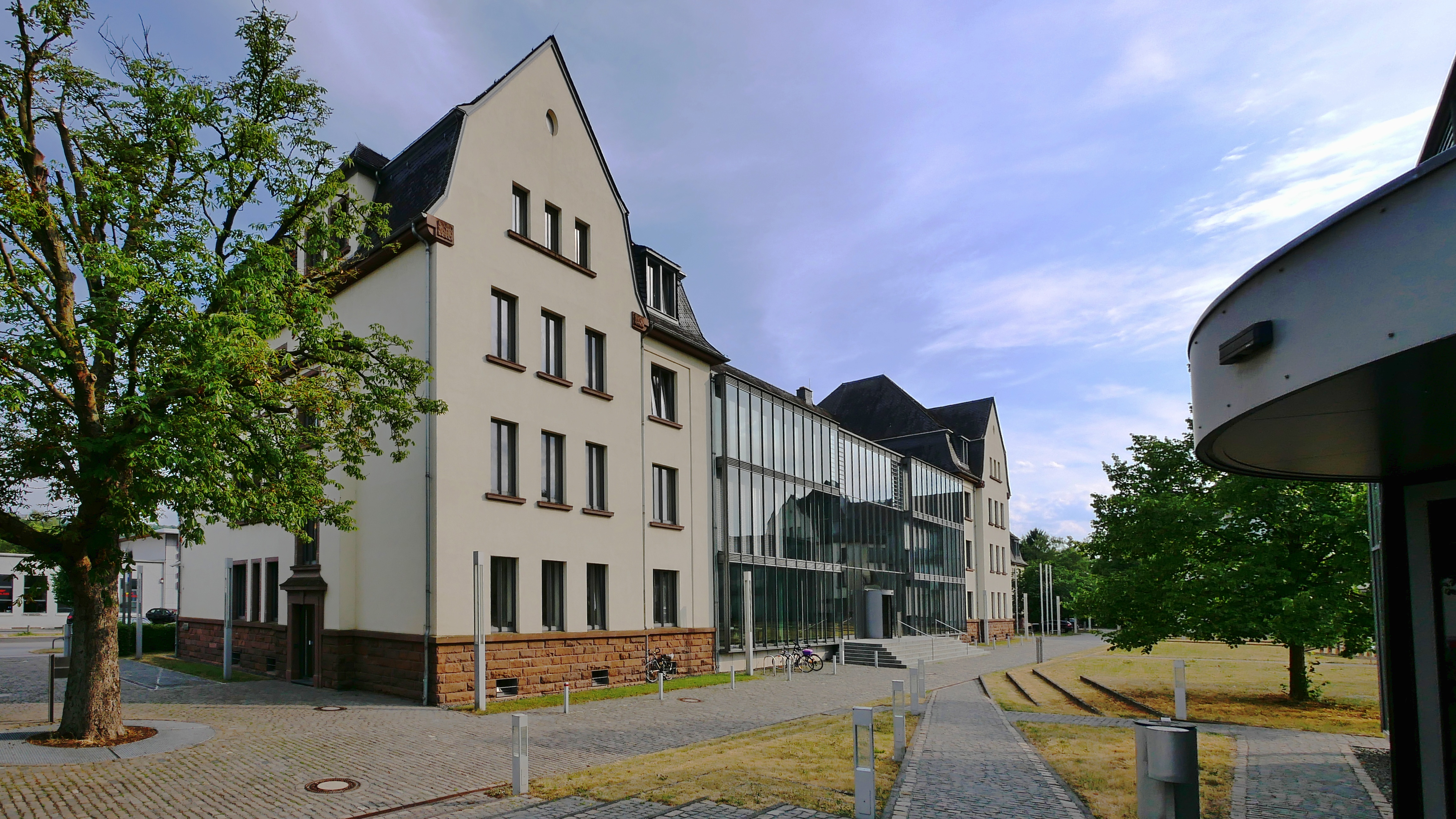 Trier :ehemalige Jaegerkaserne HerzogenbuscherStrasse 12 jetzt Sitz der IHK Trier